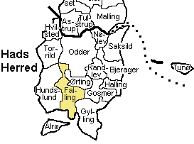 Kort der viser Falling Sogn, Hads Herred, Århus Amt, Denmark.